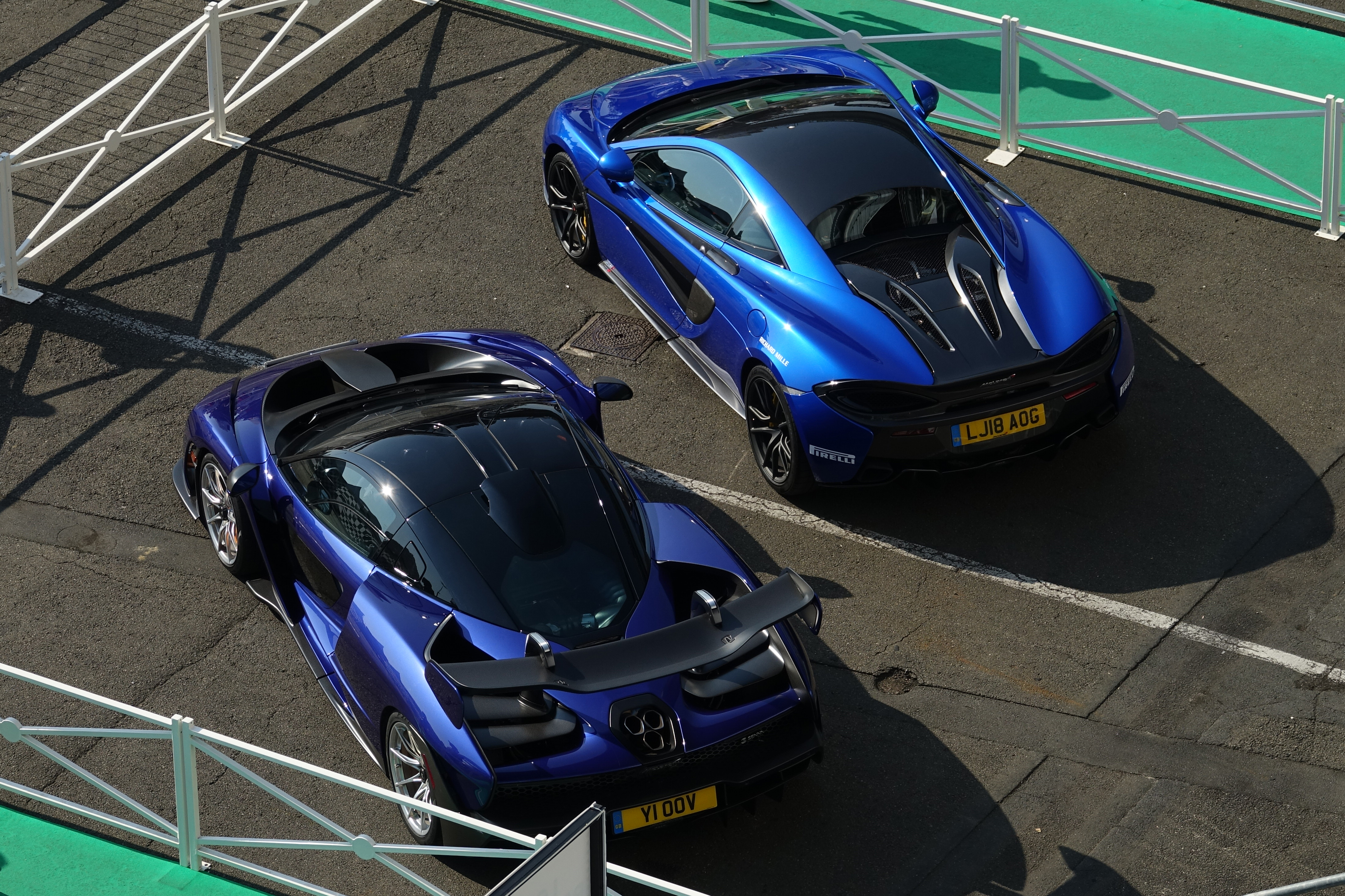 McLaren Senna et 570S au Mans Classic 2018